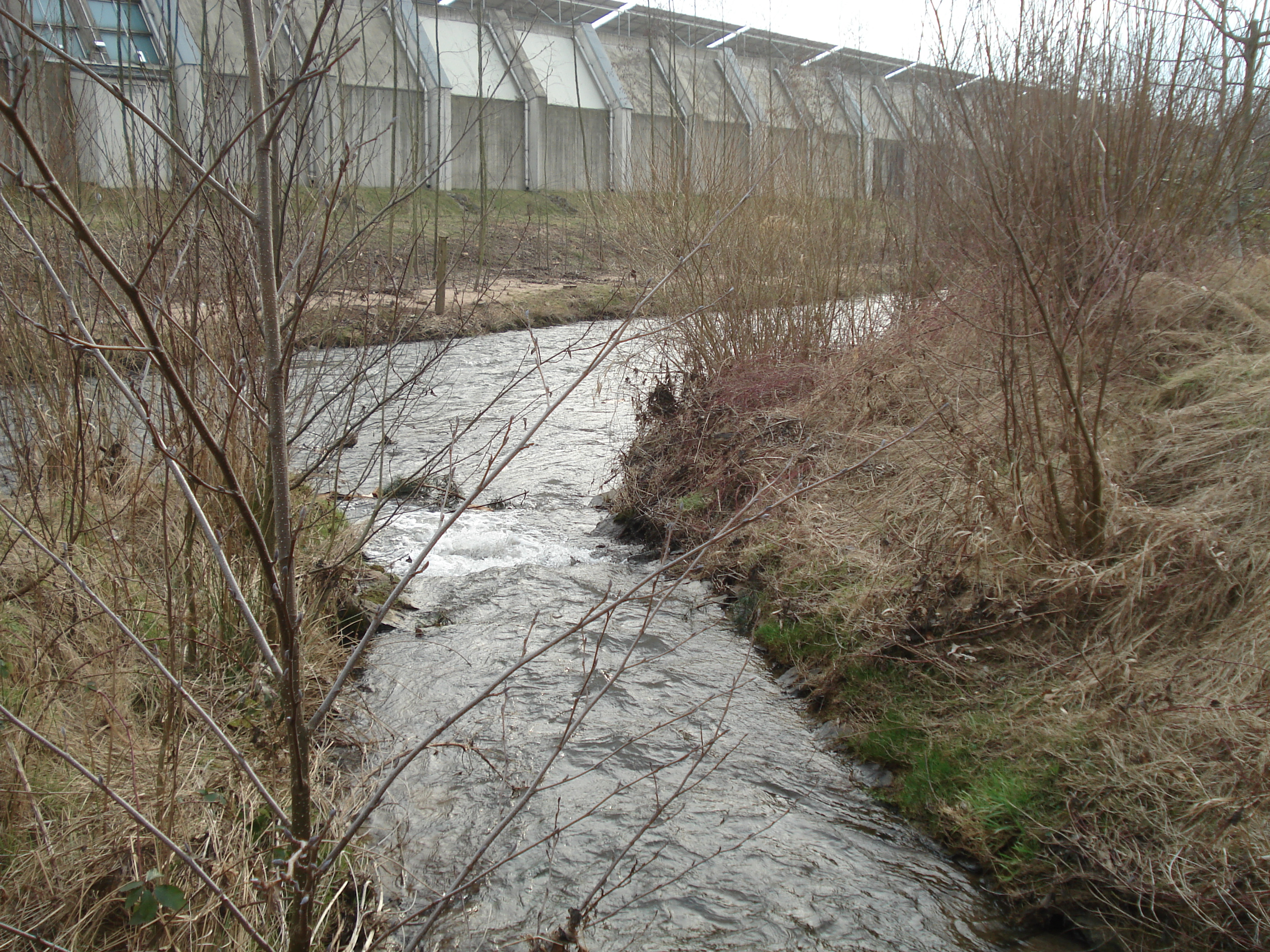 Die Mündung des Hösbaches in die Aschaff